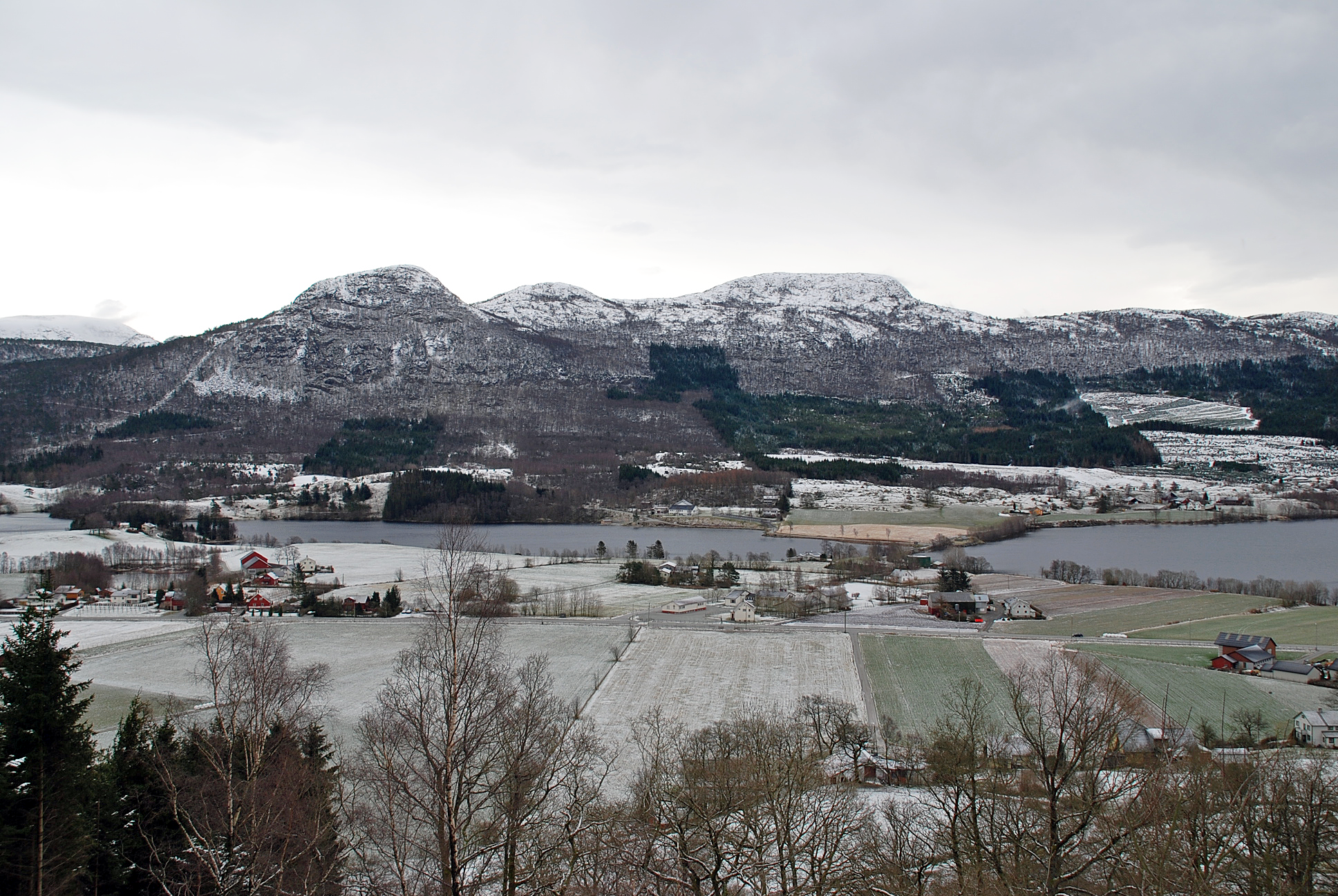 Bjørheimsbygd en kald påskemorgen, tatt fra Holta.